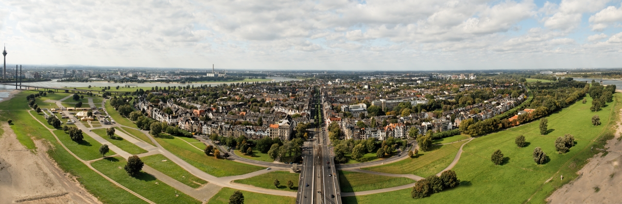 Düsseldorf-Oberkassel Panorama